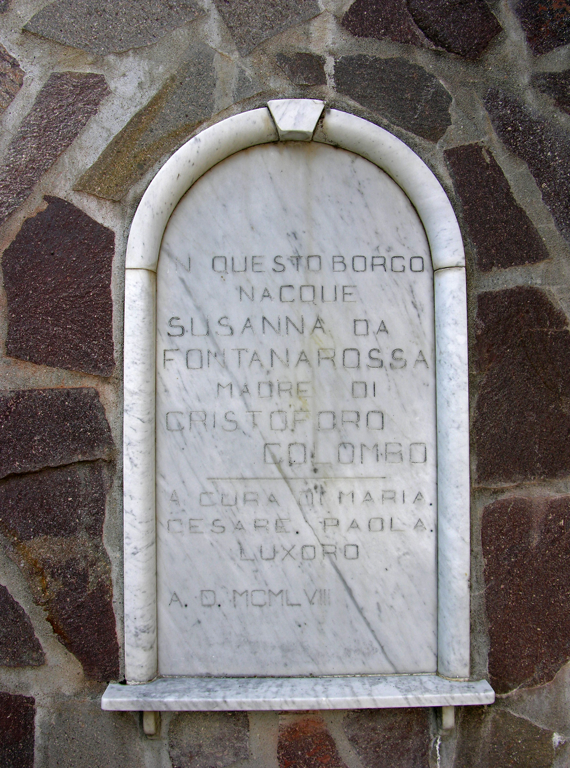 Particolare della lapide in memoria di Susanna Fontanarossa, Gorreto, frazione Fontanarossa (GE) Italy.